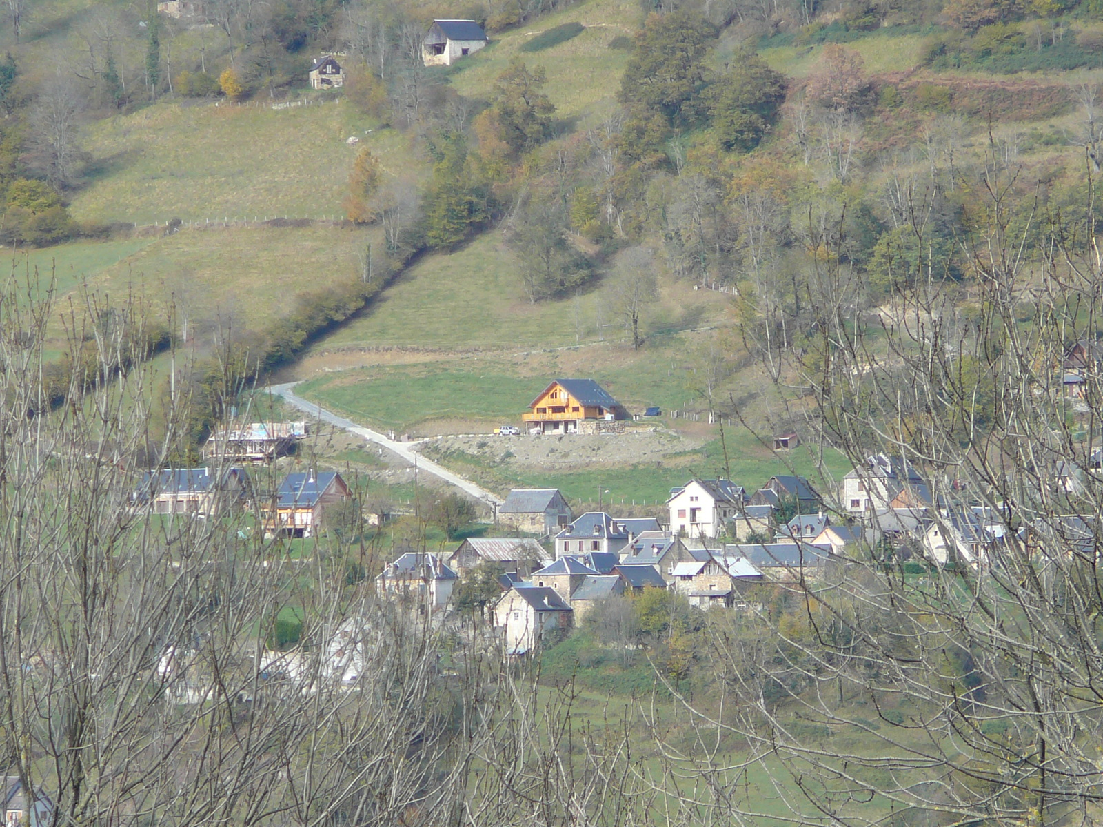 Vue du village